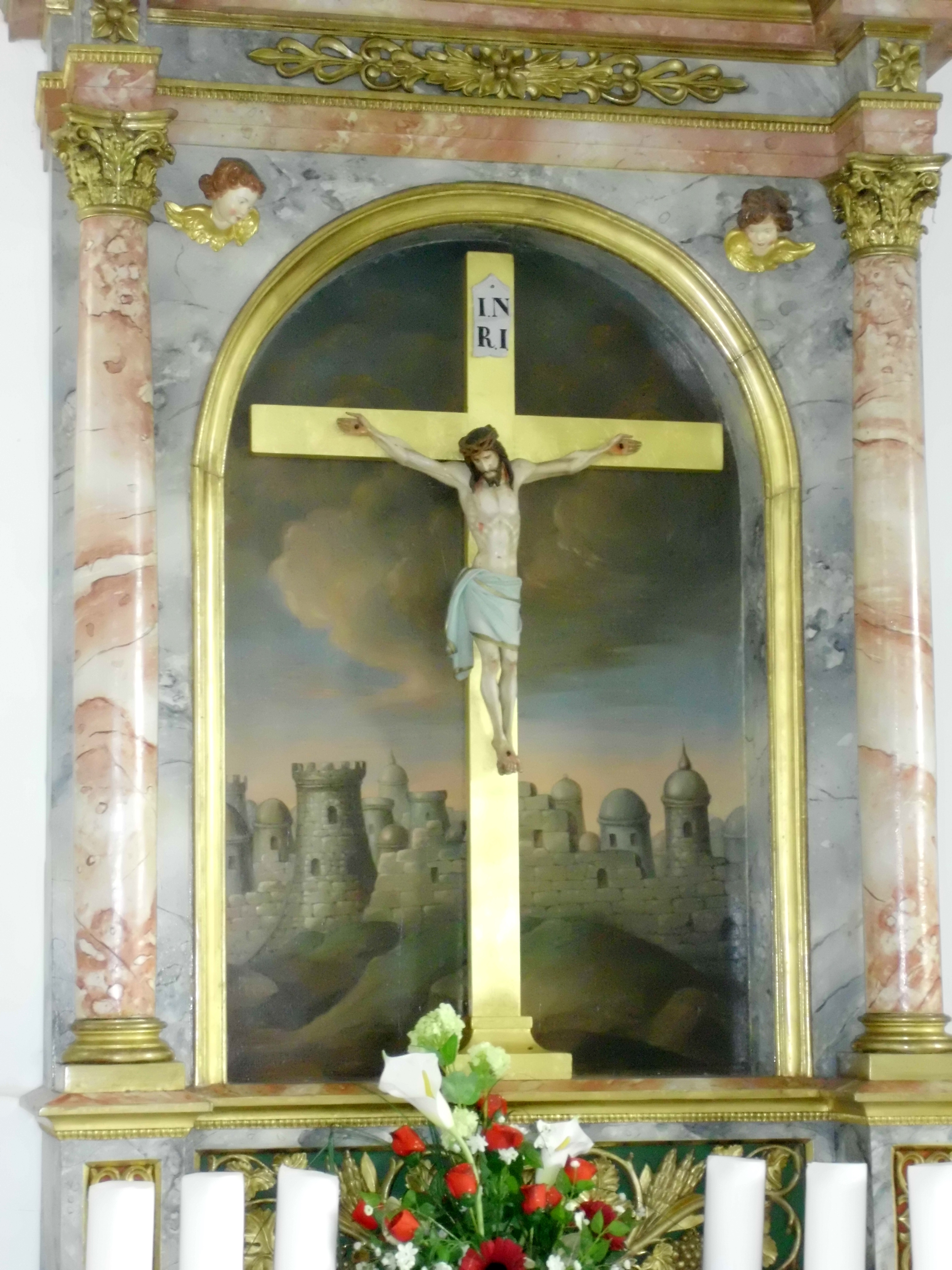 Altar von St. Jakob in Häslabronn, einem Ortsteil des mittelfränkischen Colmberg